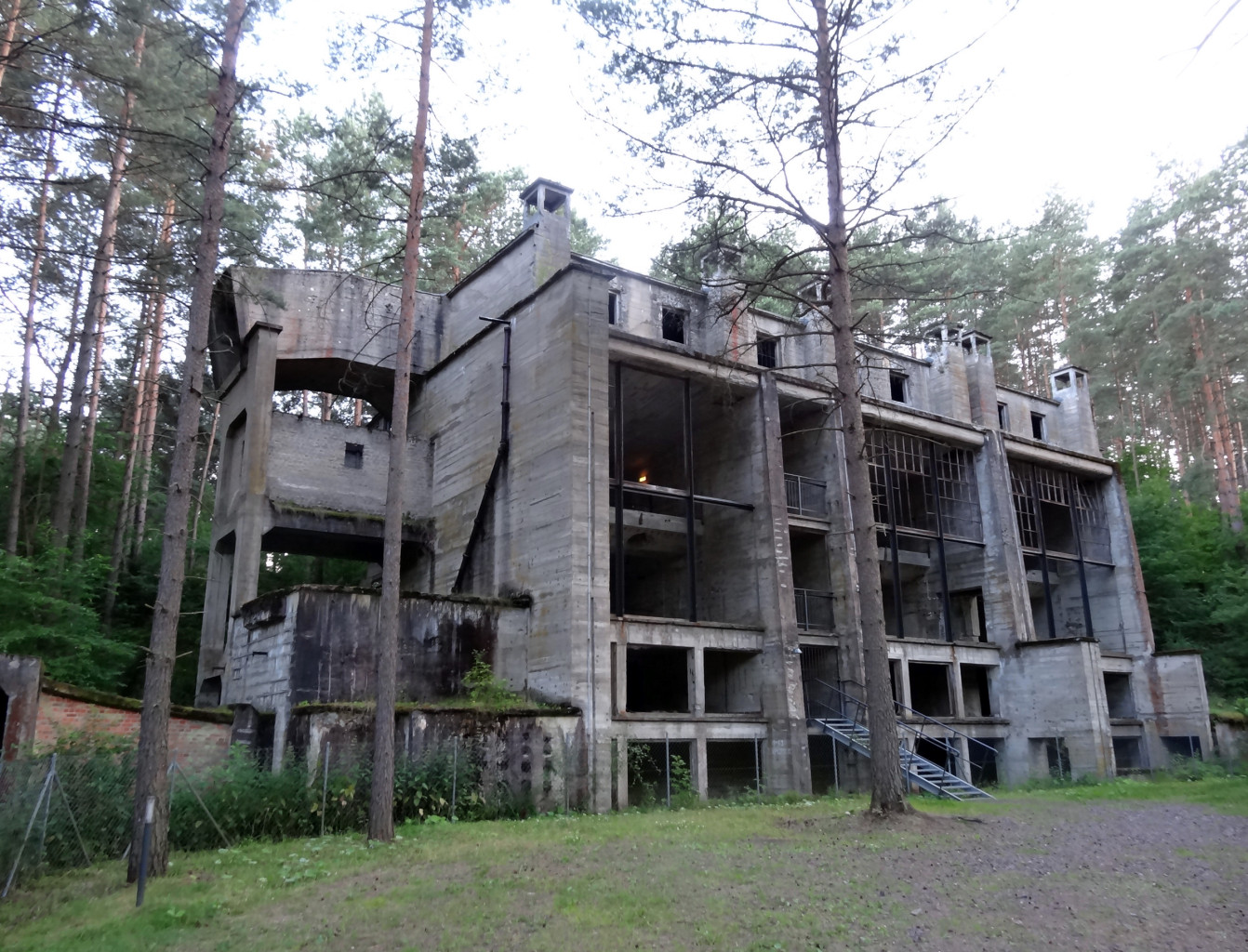 Obiekty zewnętrzne na terenie Eksploseum w Bydgoszczy - oddział Muzeum Okręgowego im. Leona Wyczółkowskiego w Bydgoszczy, prezentująca architekturę przemysłową III Rzeszy na obszarze DAG Fabrik Bromberg